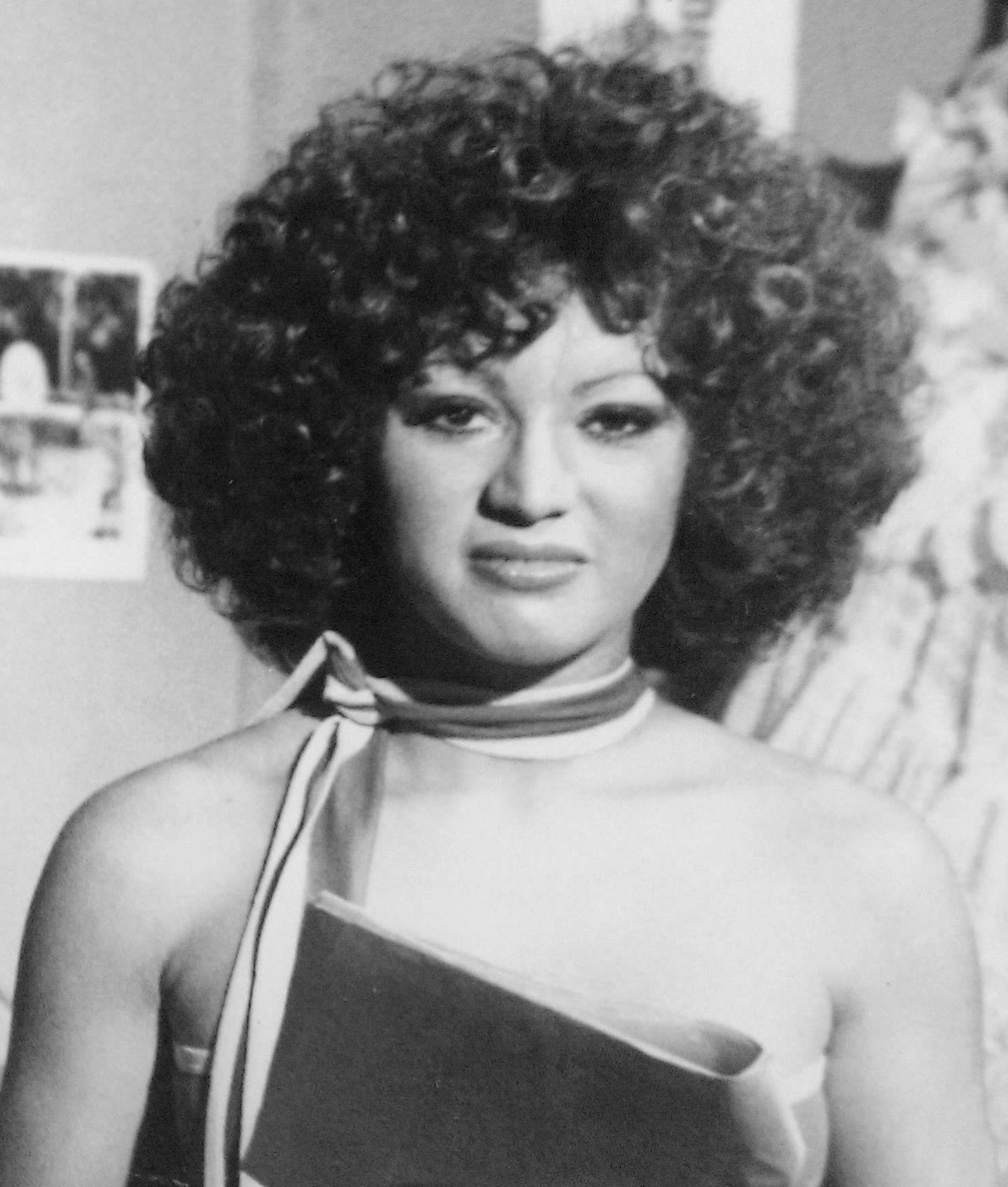 Foto de Iris Chacón y Gilberto Varela en 1976.